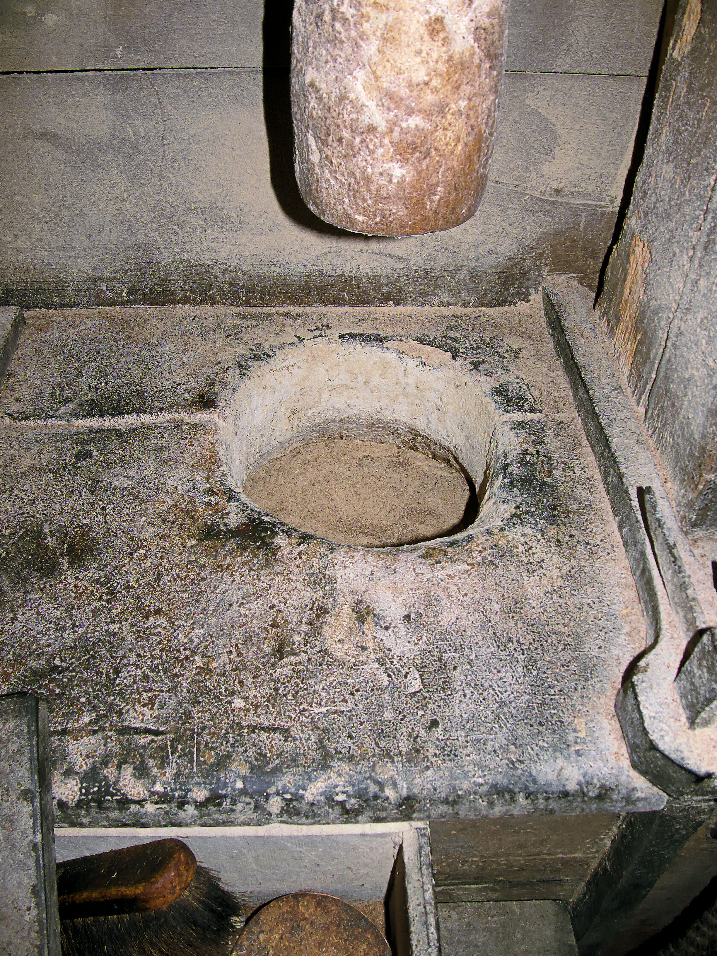 Molen De Passiebloem stamperpot